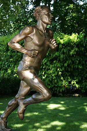 Lausanne: Le Parc Olympique (Emil Zátopek)